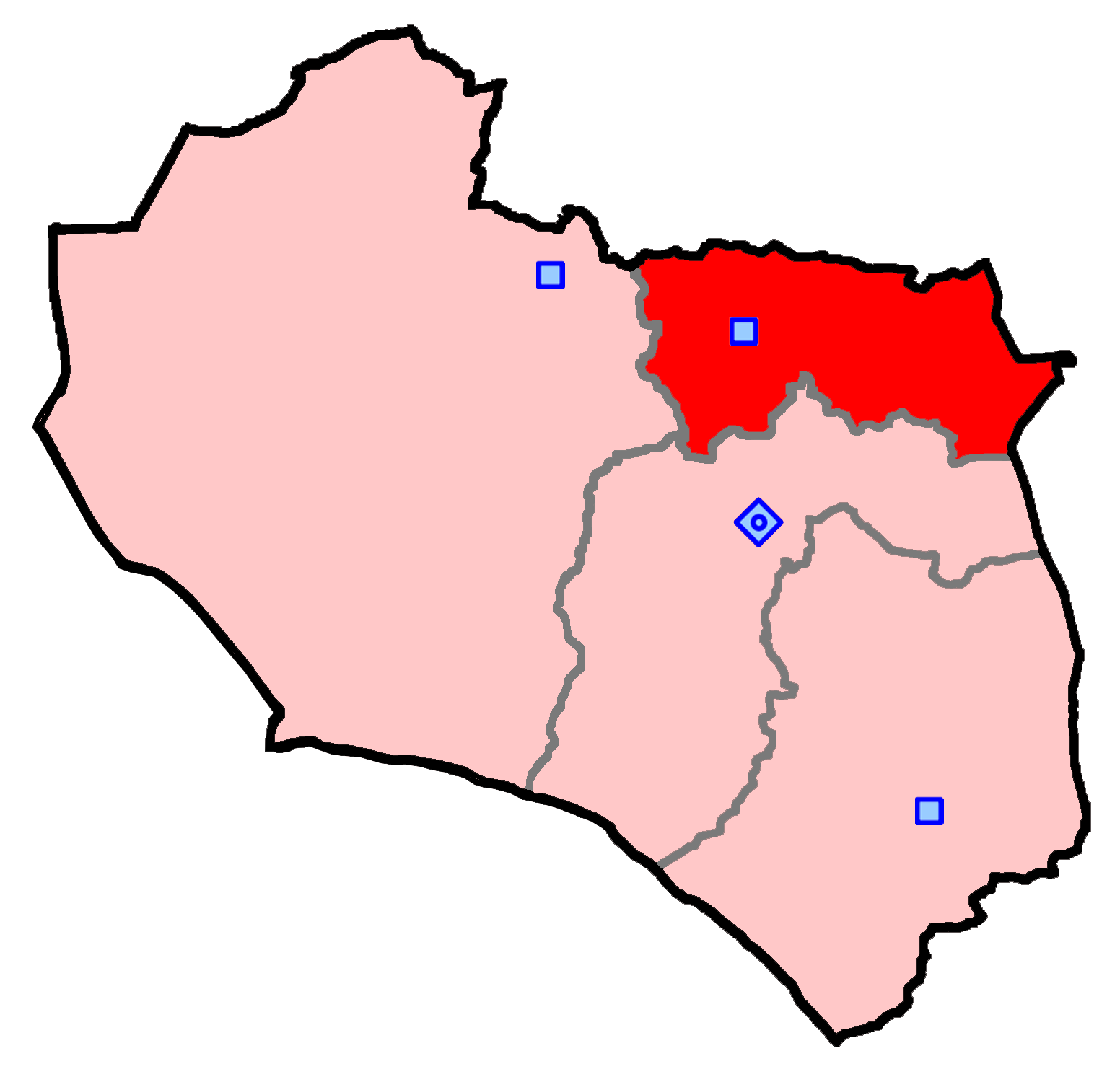 حوزهٔ انتخاباتی قائنات و زیرکوه برای انتخابات مجلس شورای اسلامی